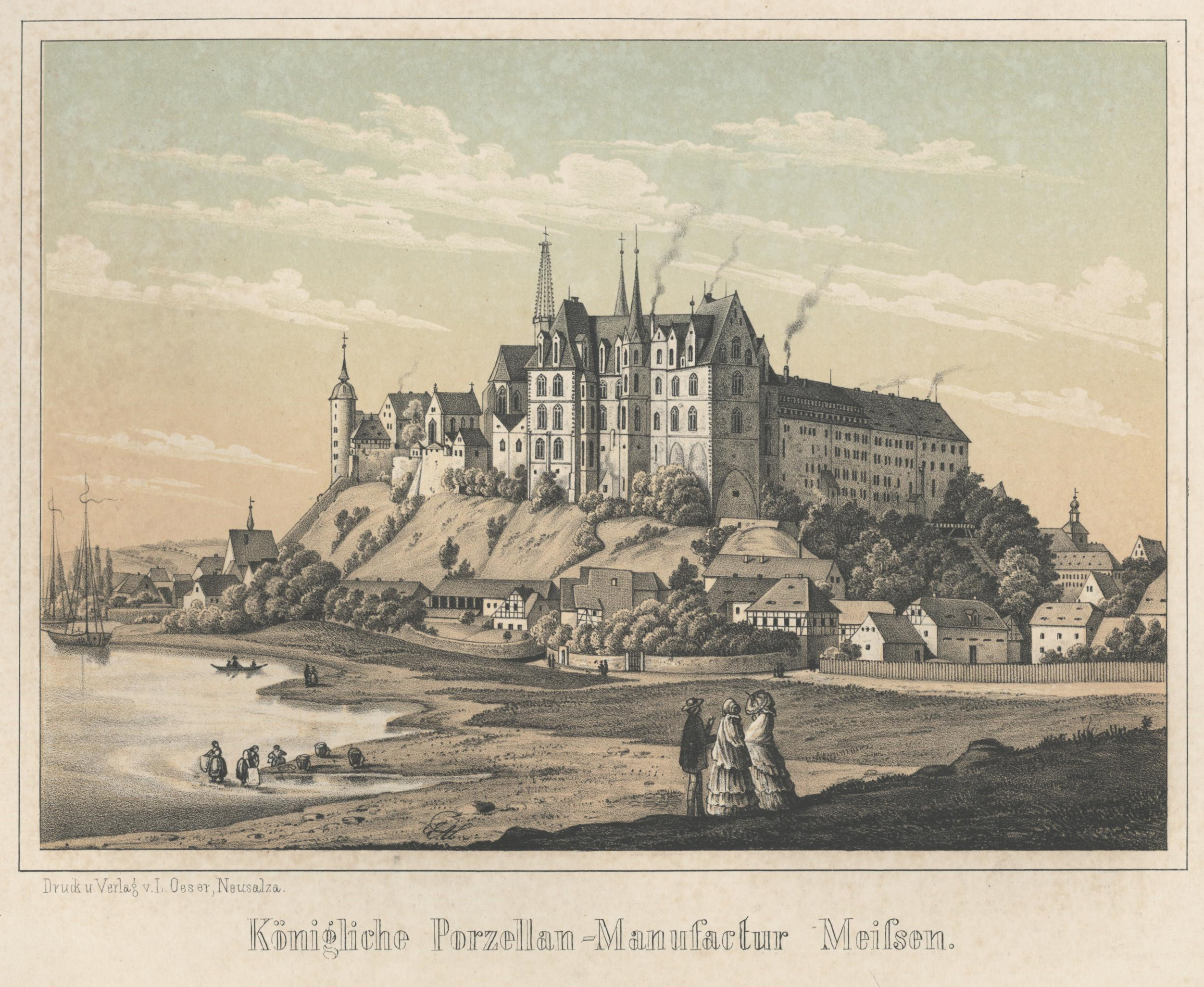 Königliche Porzellan-Manufactur Meissen aus: Album der Sächsischen Industrie Erster Band